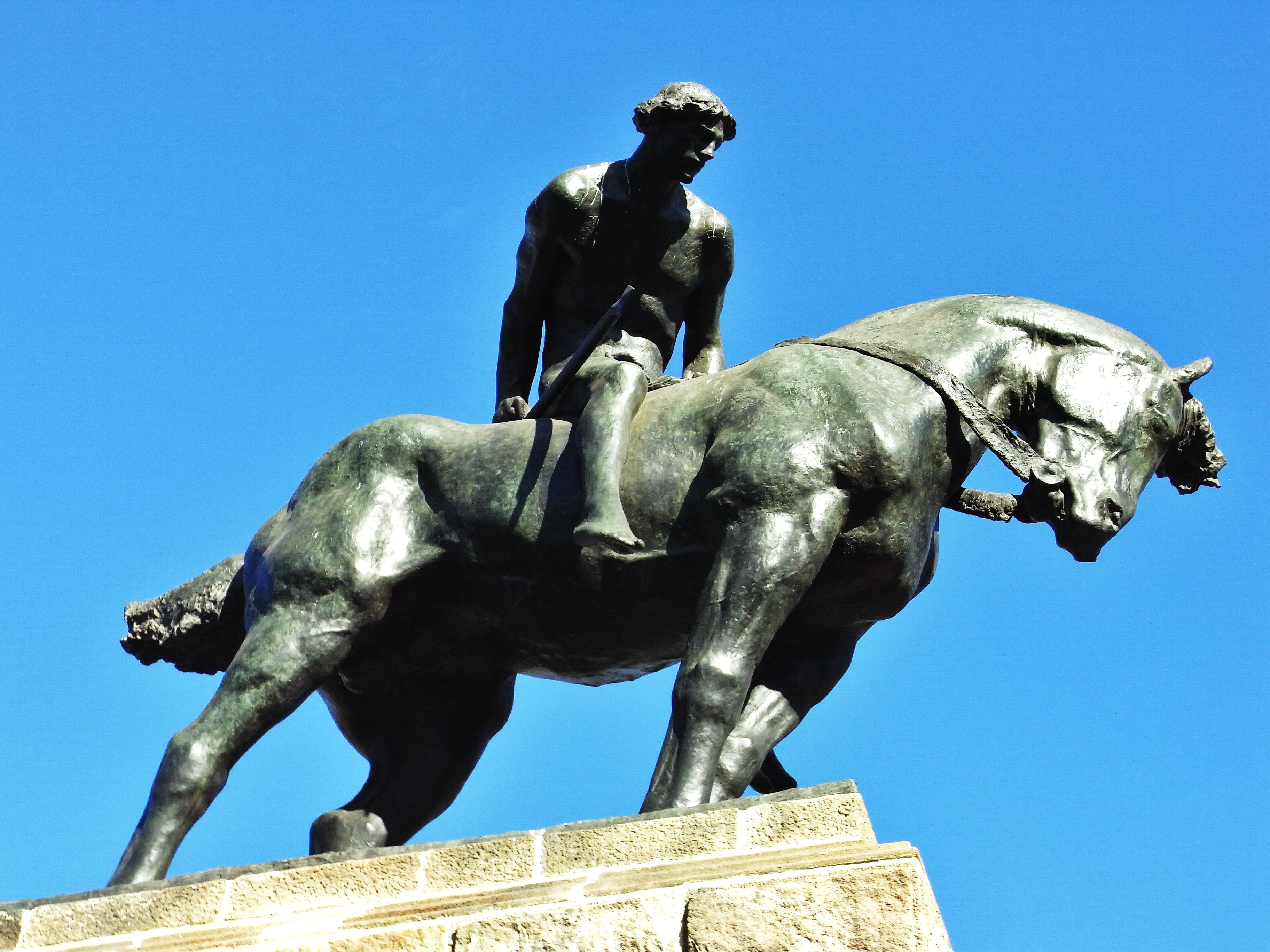 Estàtua eqüestre de Sant Jordi (Barcelona)